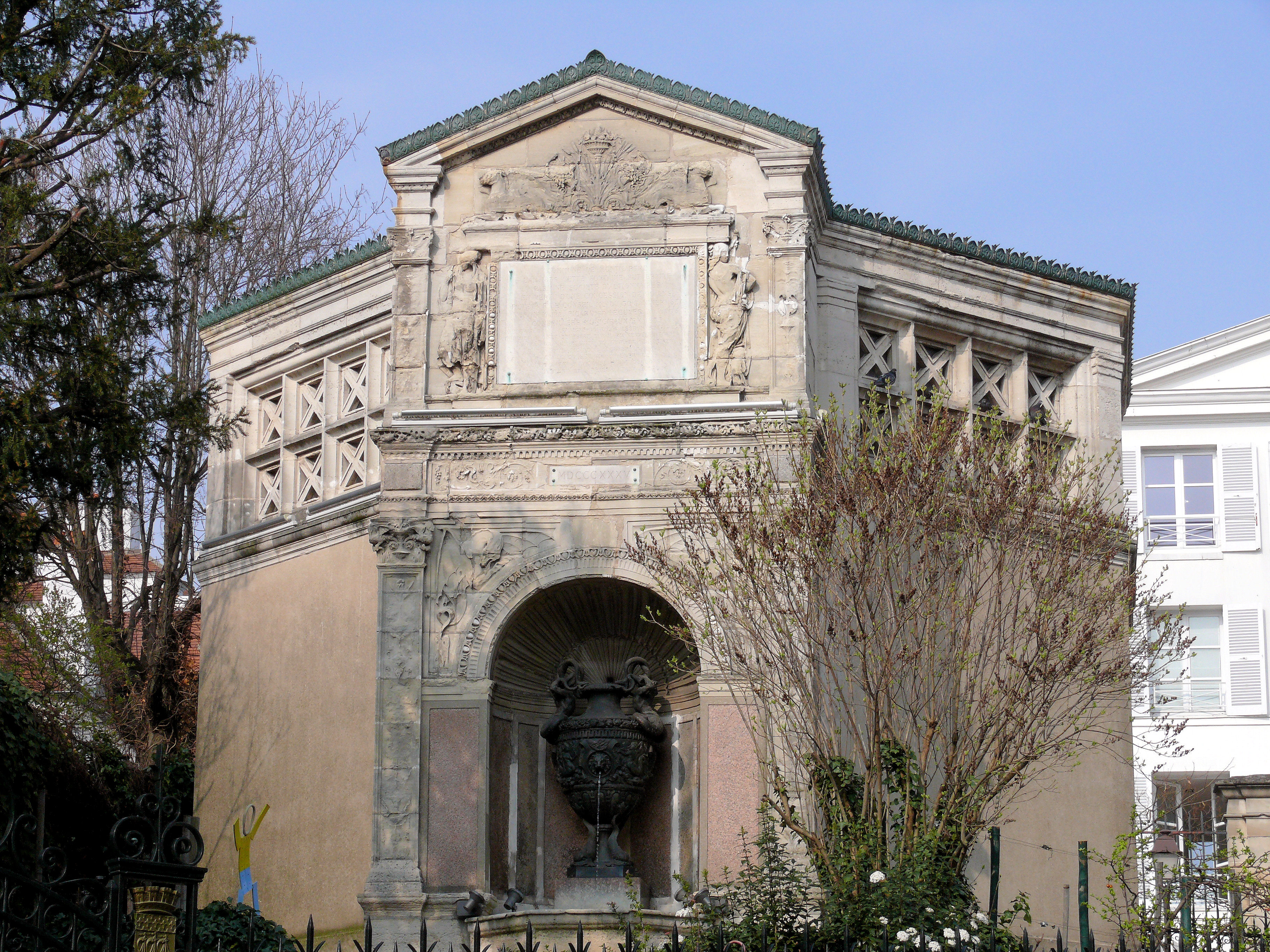 Paris 18e arrondissement - Réservoir entre rue Lepic et rue Norvins